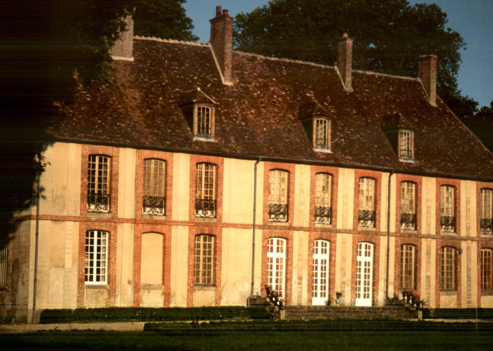 à Ferreux-Quincey, une_Carte Postale_du_château du Paraclet.